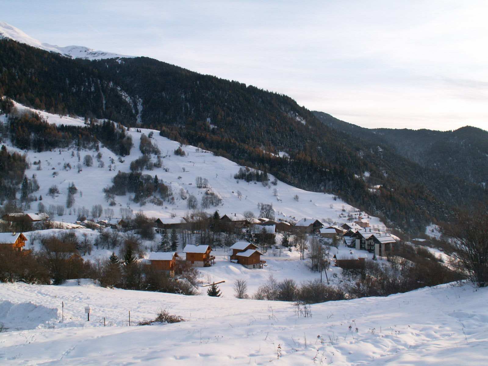 Le village de Notre Dame du pré, vu du centre l'Alpestre. Derrière, les pistes de ski. La crête visible au fond, monte vers le mont des Archers.